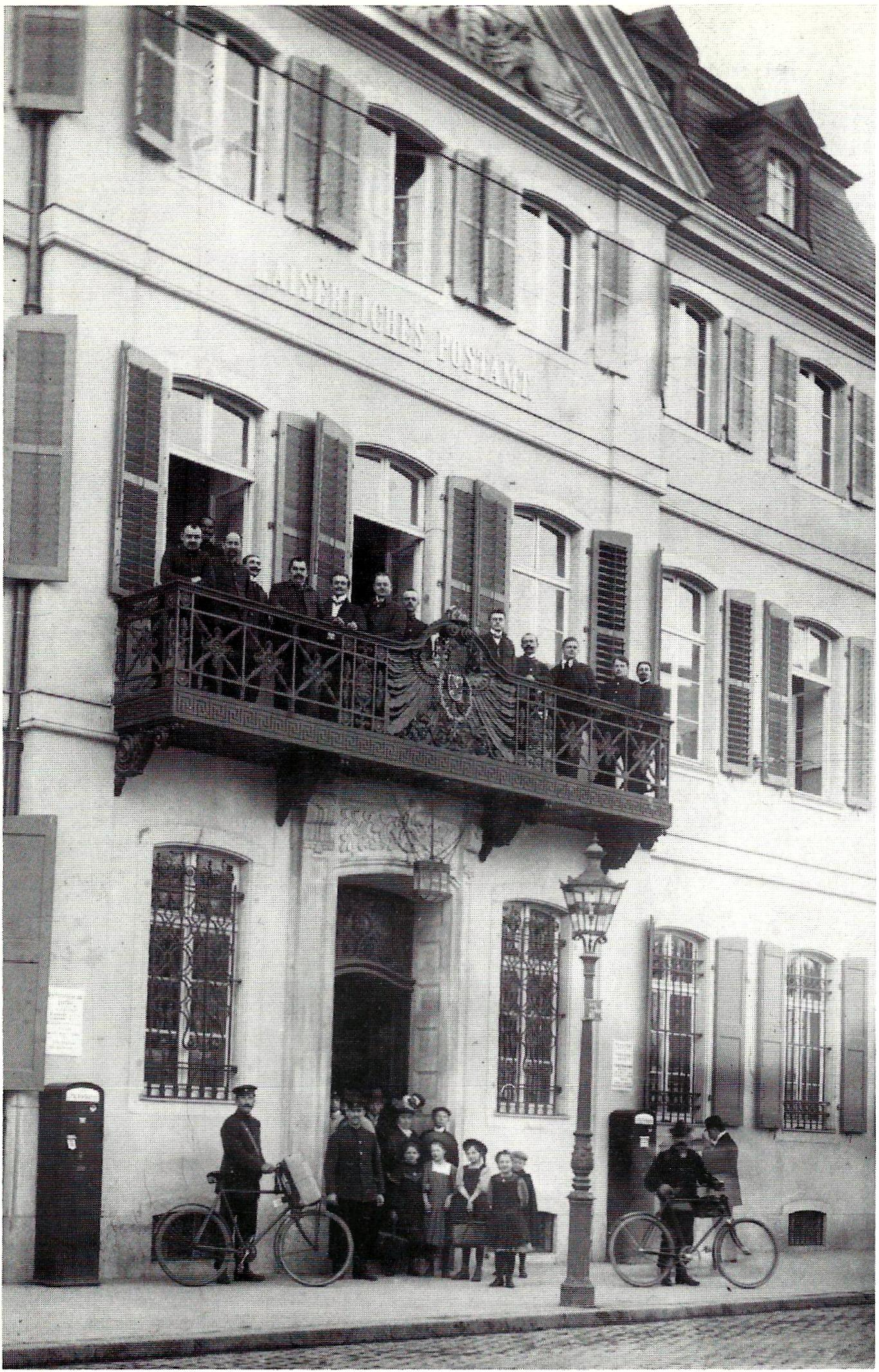 Hauptpostamt, Münsterplatz, Bonn: Mittelteil mit dem 1909 angelegten und 1938 wieder beseitigten Mitteleingang